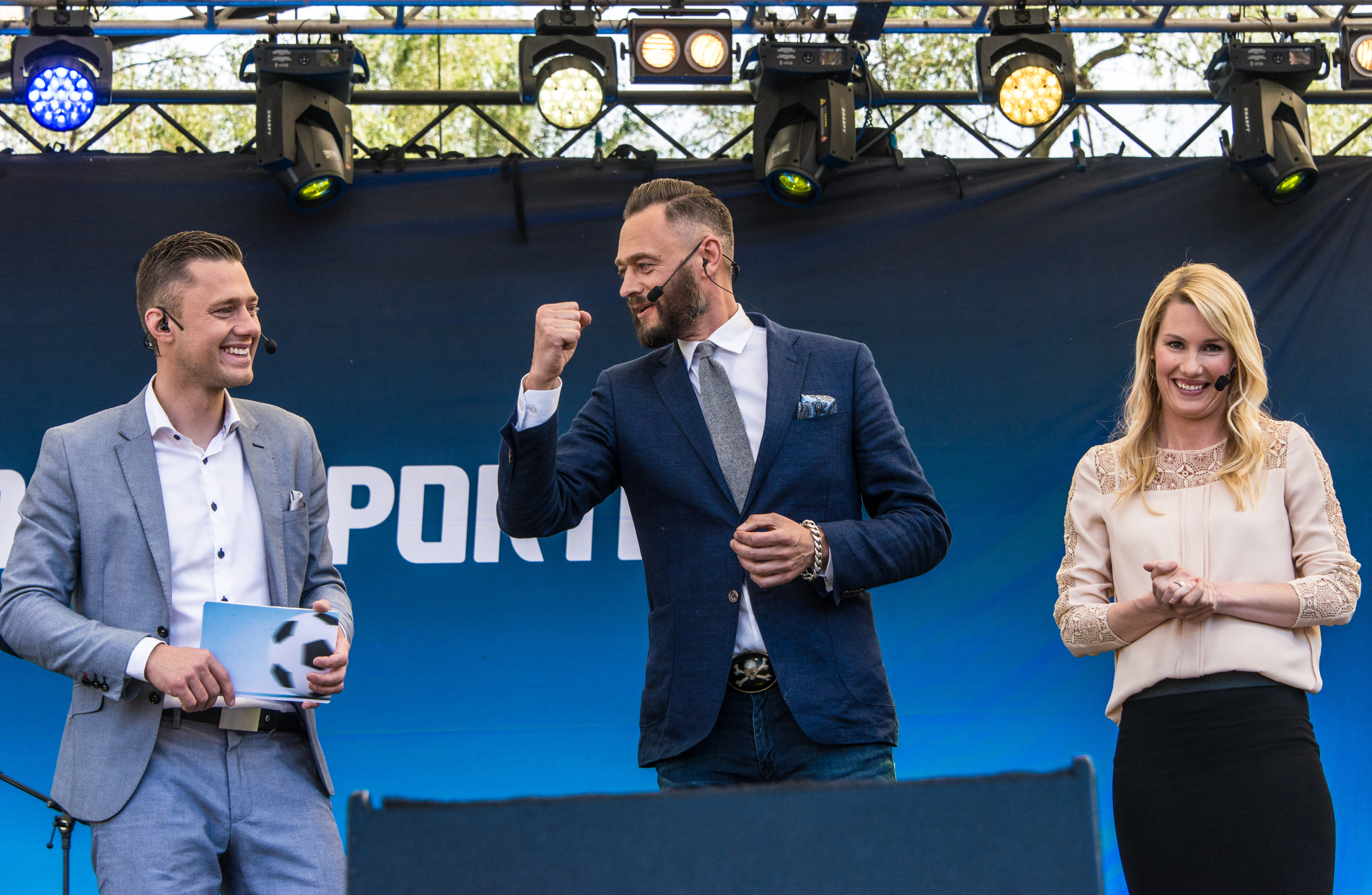 Per Skoglund, Olof Lundh and Hanna Marklund i samband med att Sveriges U21-landslag blir firad i Kungsträdgården i Stockholm den 1 juli av 1000-tals fans efter guldet i U21-Europamästerskapet i fotboll 2015.